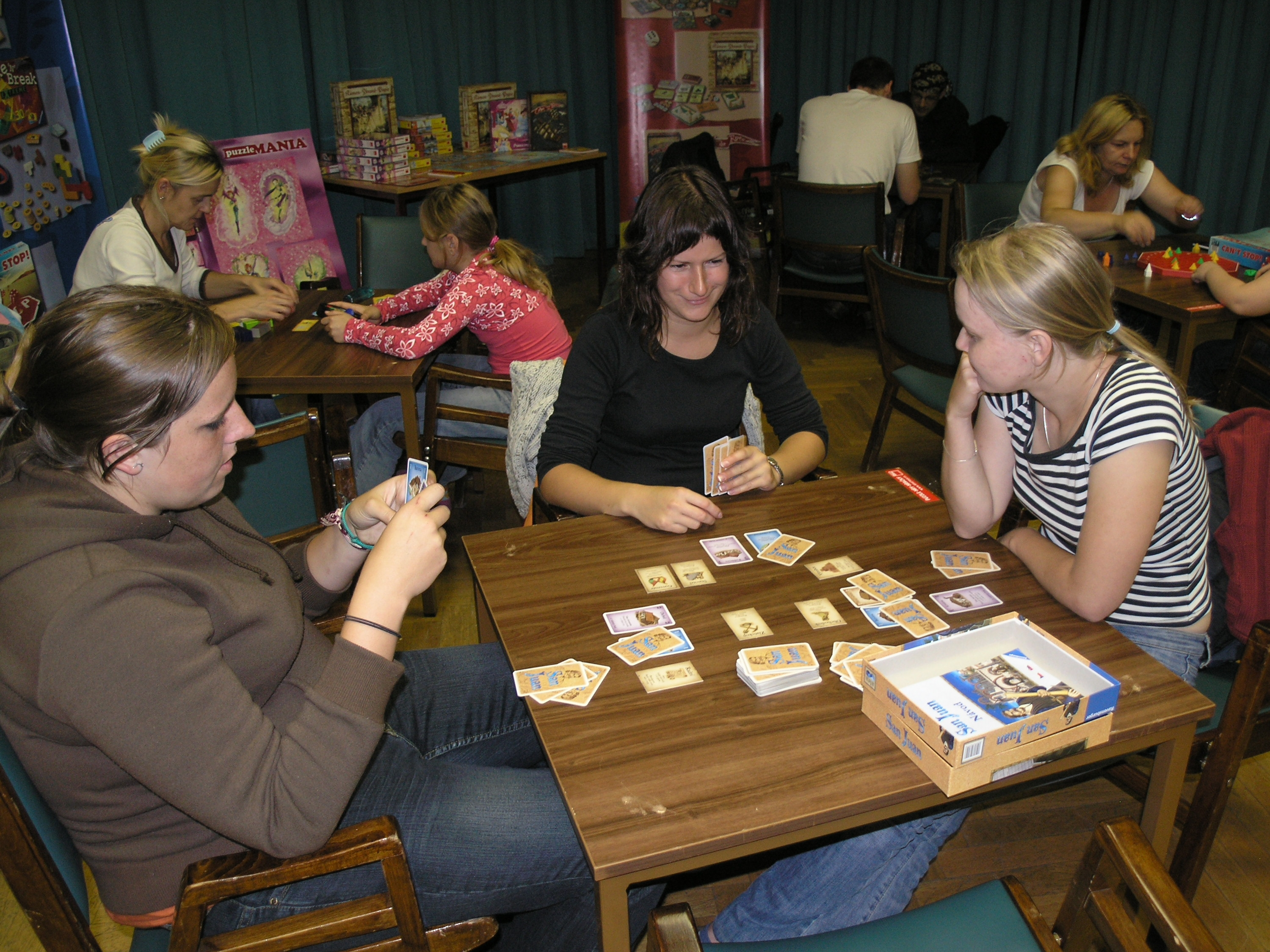 Hry a hlavolamy 2008 - festival her a hlavolamů v Praze, Holešovicích